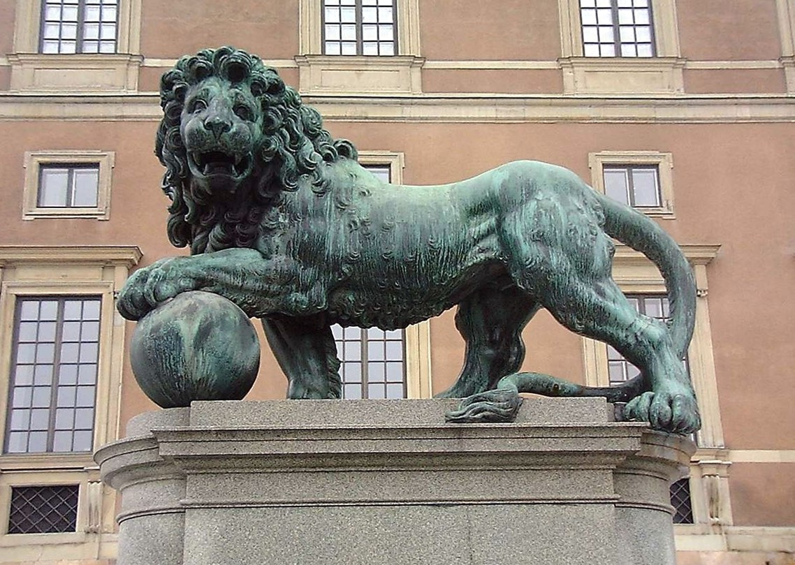 Lejonbacken, Gamla stan, Stockholm